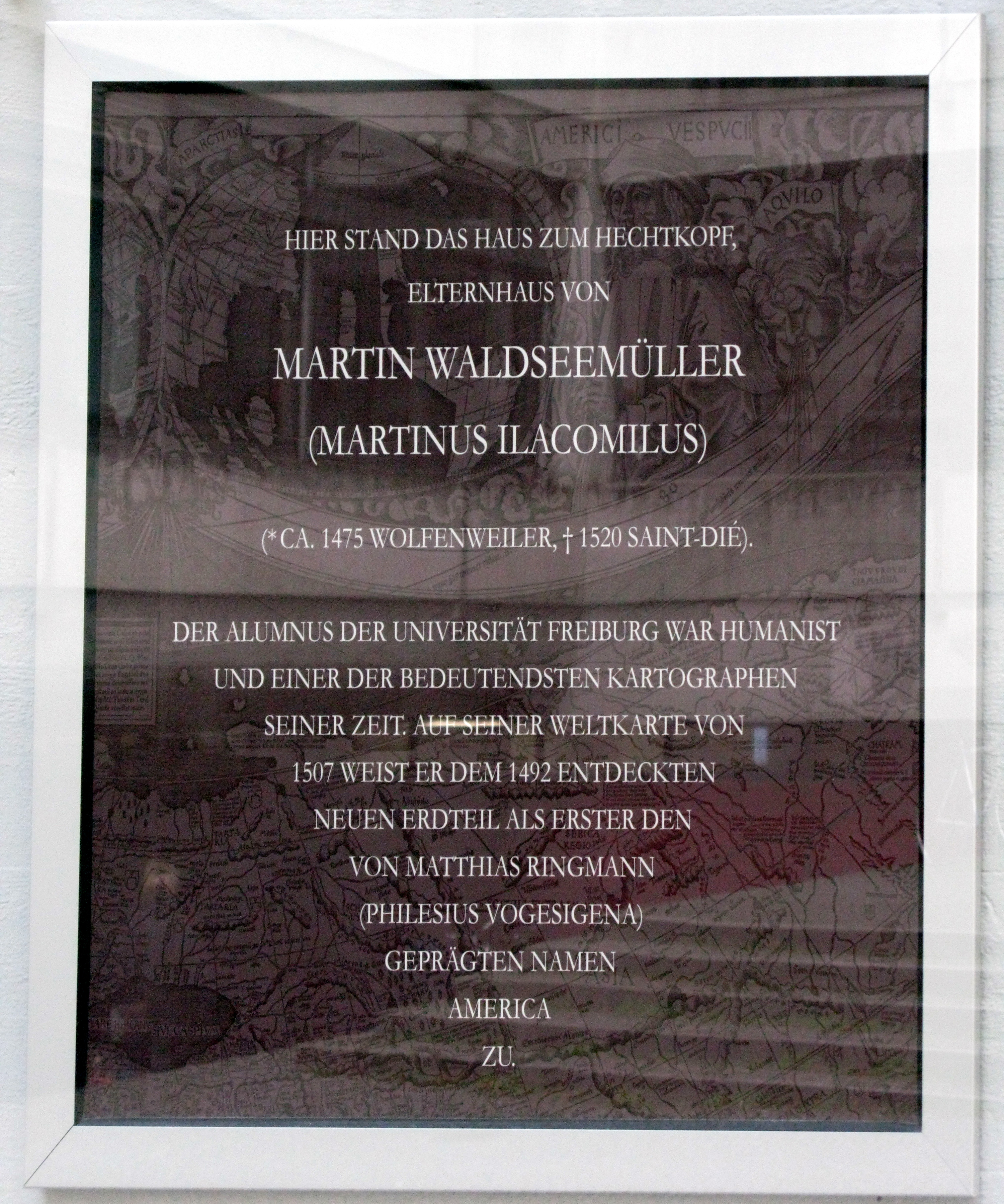 Gedenktafel für Martin Waldseemüller in Freiburg